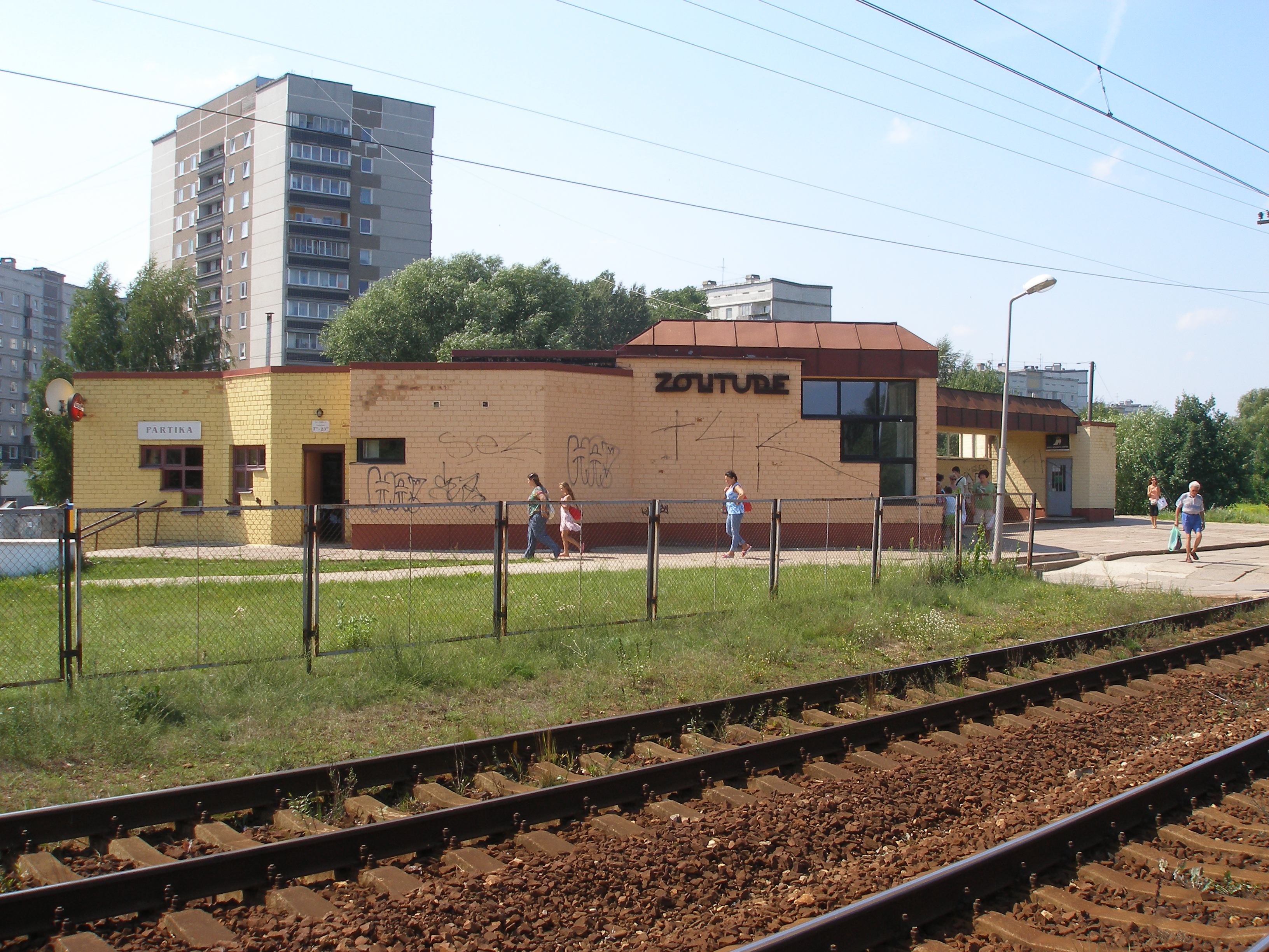 Zolitūdes stacijas ēka.